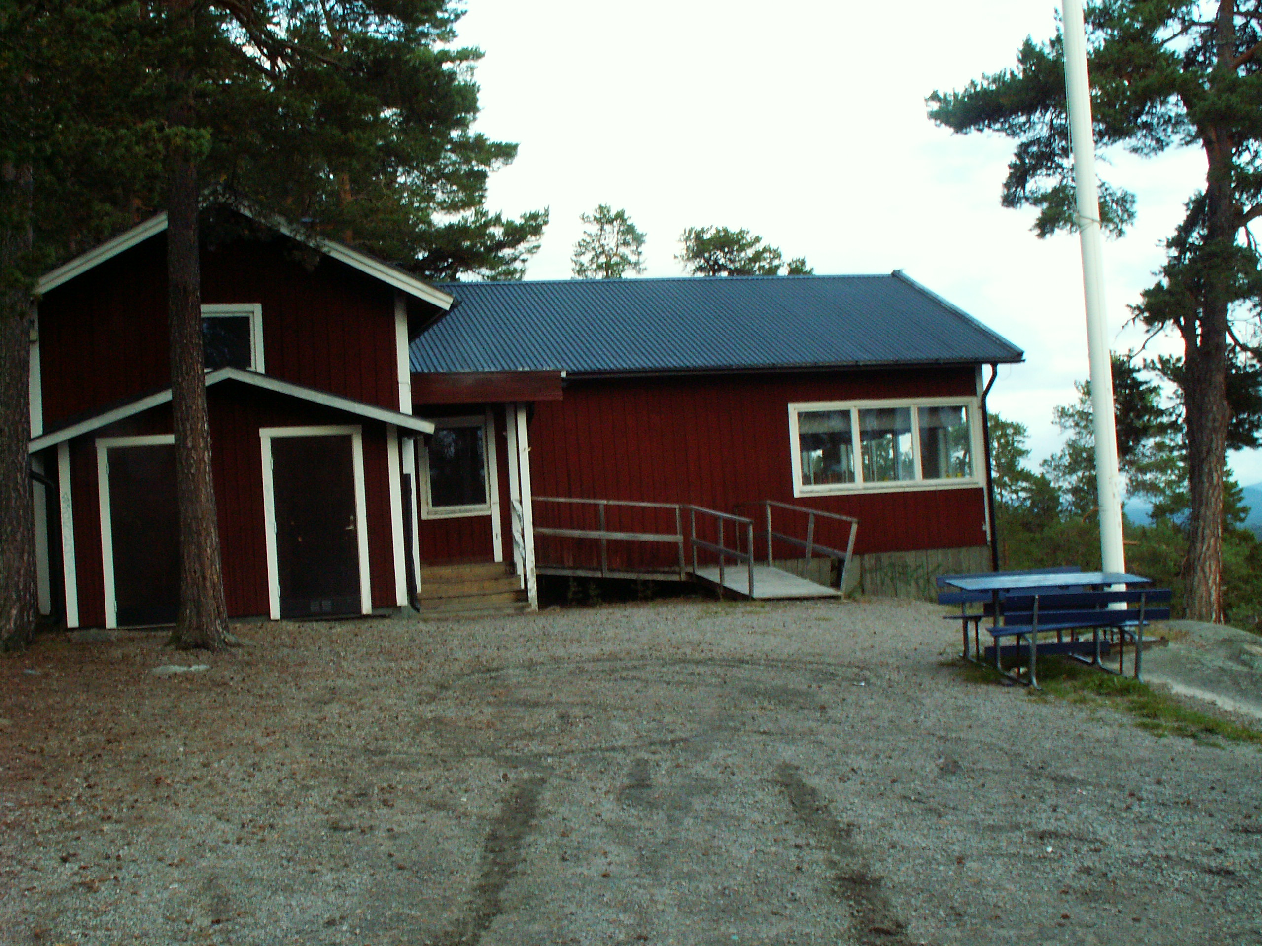 Kolsvedjastugan in Ljusdal, Sweden